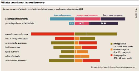 Questionnement éthique de la consommation de viande